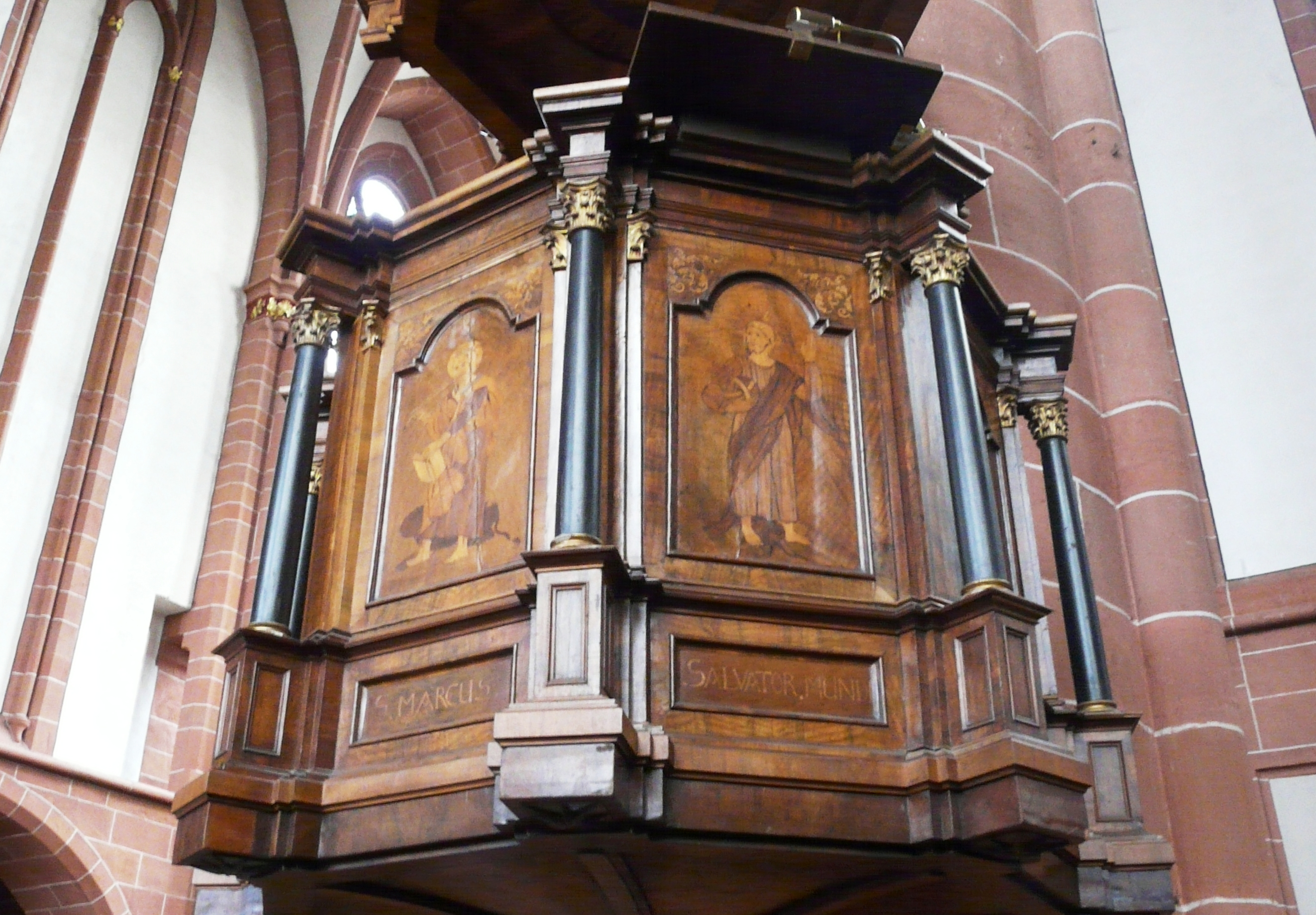 Kanzel im Wetzlarer Dom, Wetzlar (Hessen)